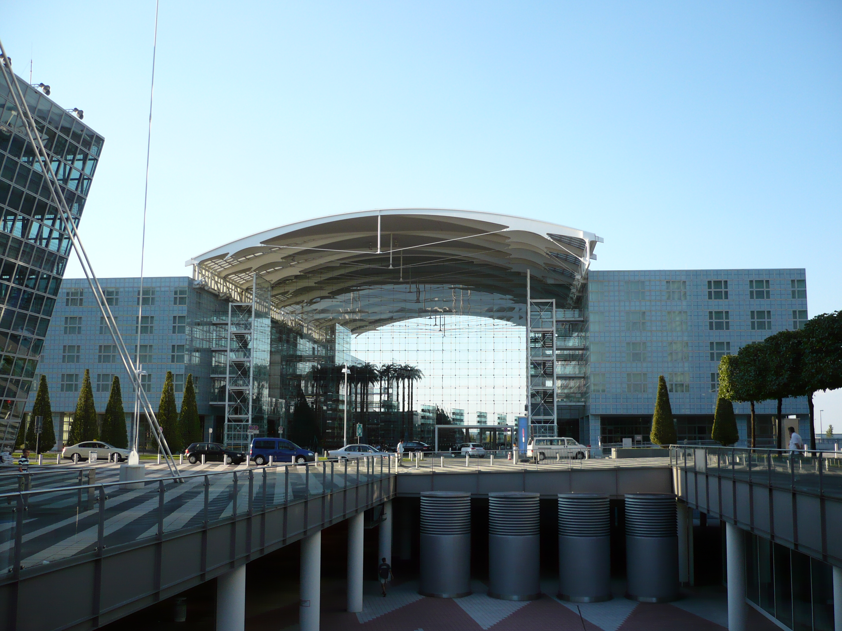 Munich Airport Center am Flughafen München